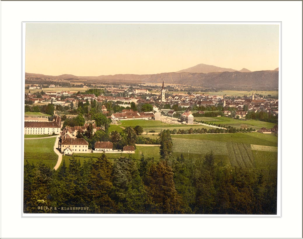 Klagenfurt from Kreuzberg Carinthia Austro-Hungary